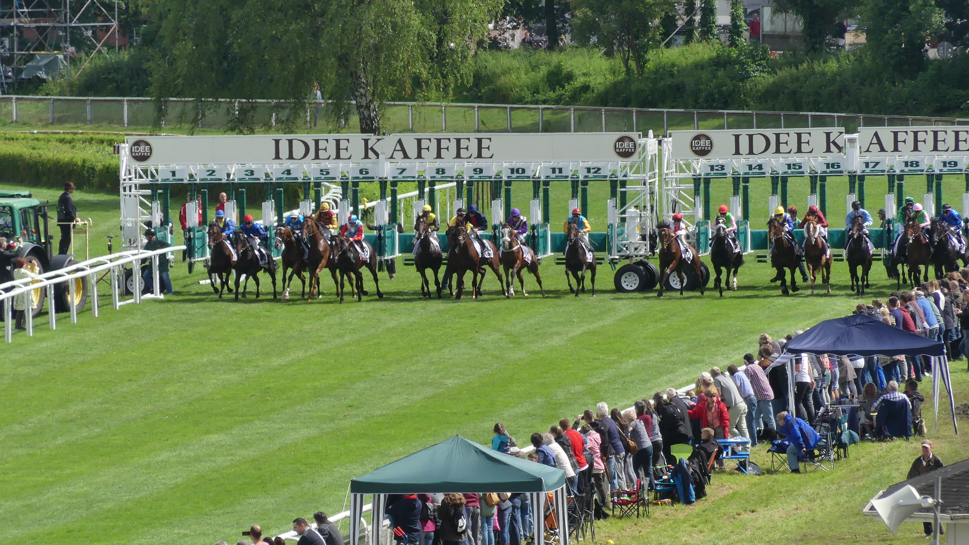 Start des Deutschen Derbys 2017